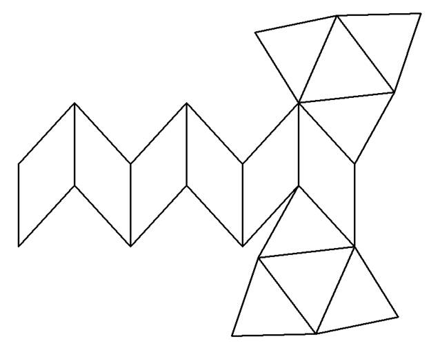 A lap-test hálója